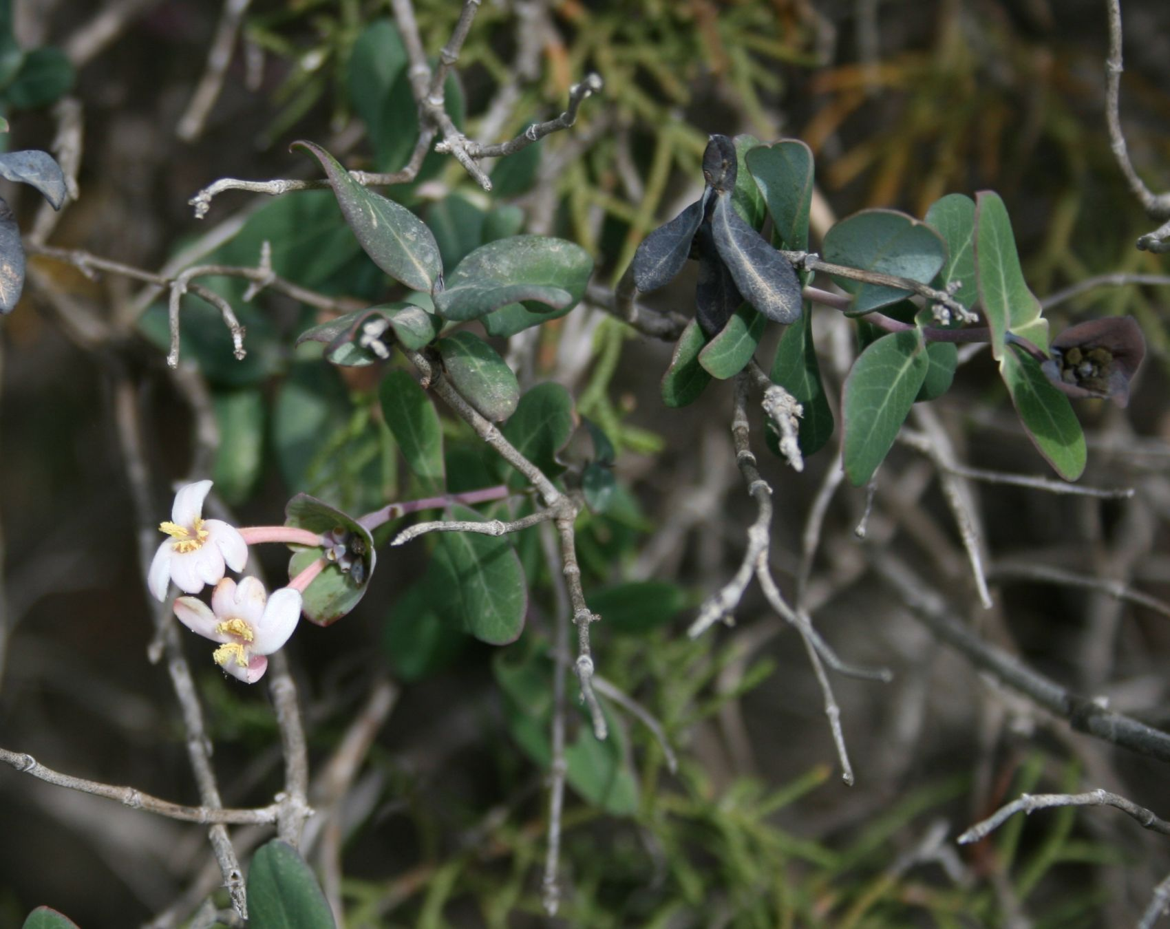 Lonicera implexa, Geißblattgewächse (Caprifoliaceae) - Italien/Italia/Italy: Kalabrien/Calabria, Prov. Crotone, Capo Rizzuto S Crotone